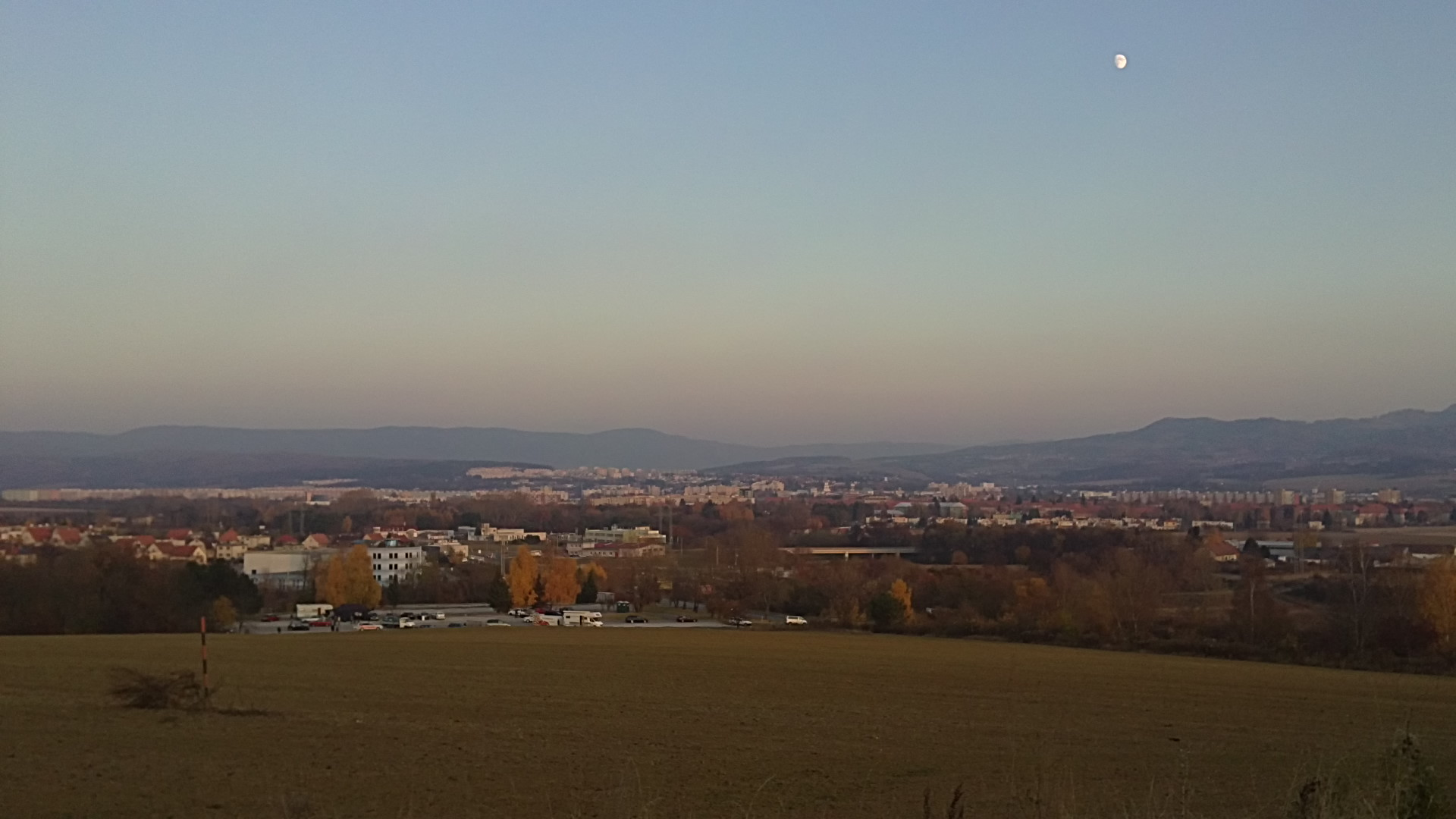 Prievidza od Bojnic